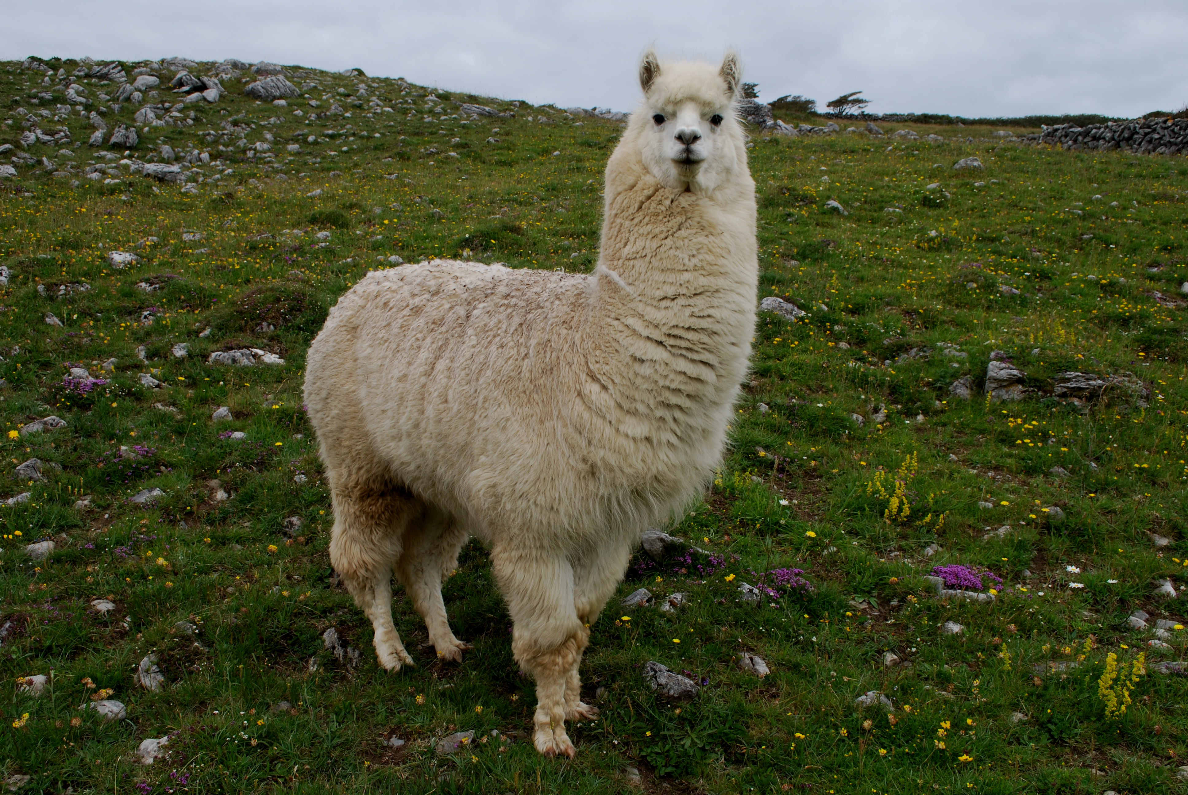 Vicugna pacosa - Ireland